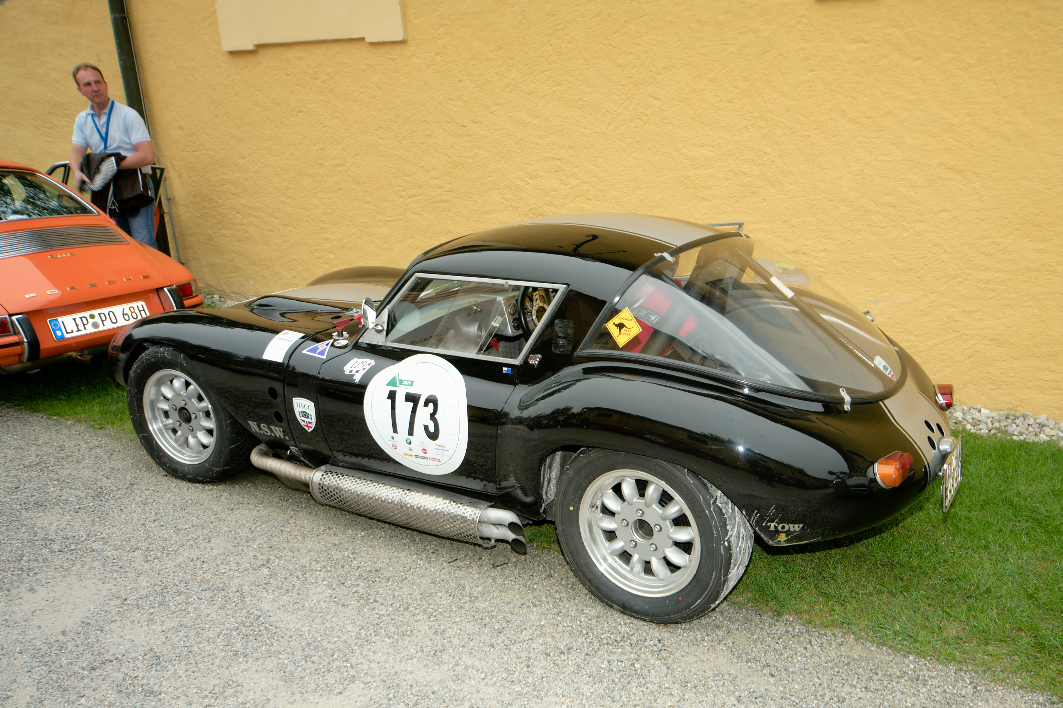 JWF Milano GT from 1962 at Gaisbergrennen 2011